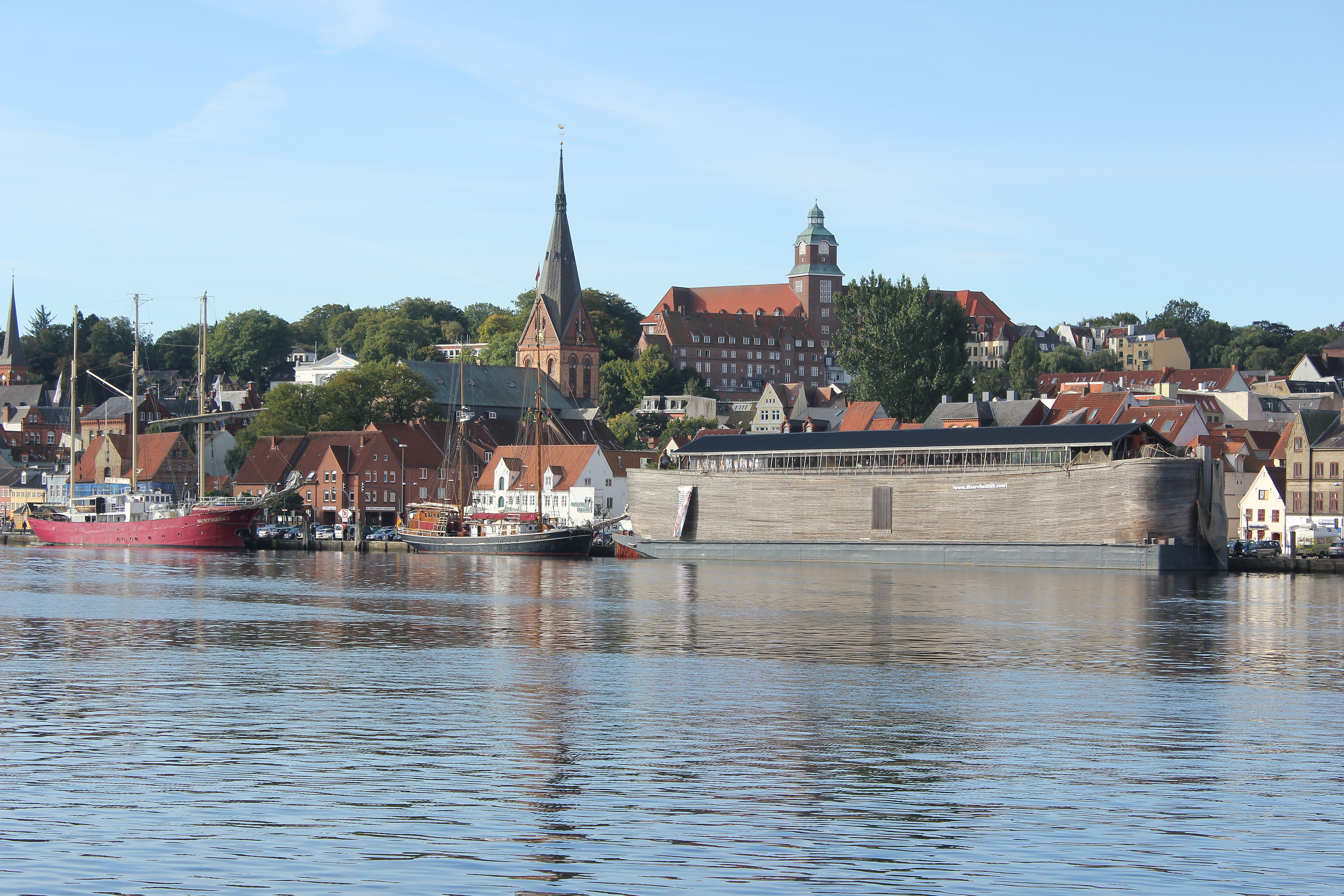 Flensburger Hafen, Schmerzhafte Mutter St. Maria Kirche, Kompagnietor, St. Marienkirche, Altes Gymnasium, Hansens Brauerei, Segelschiffe, Arche (Flensburg 2013)